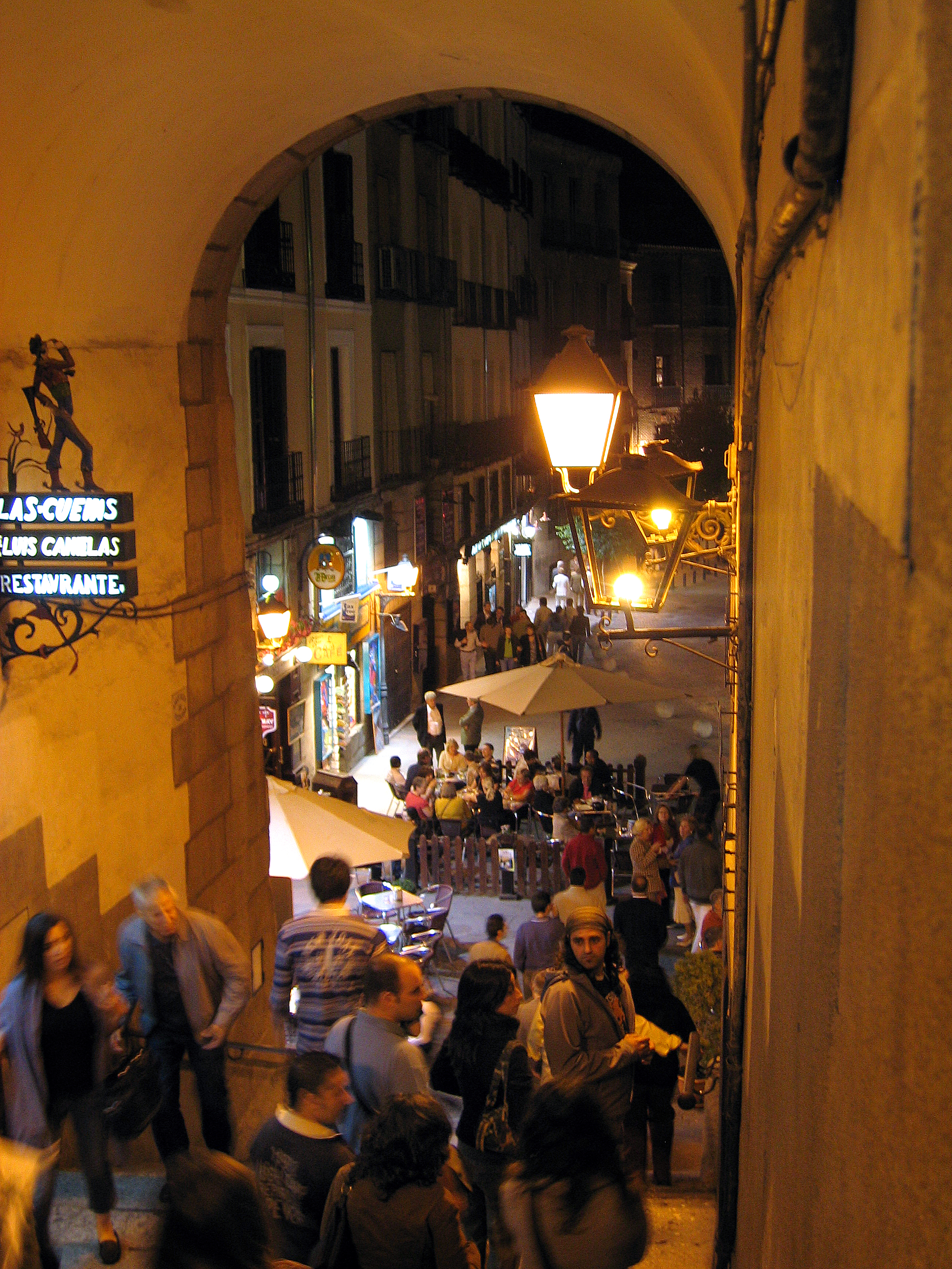 2006. Arco de Cuchilleros. Plaza Mayor